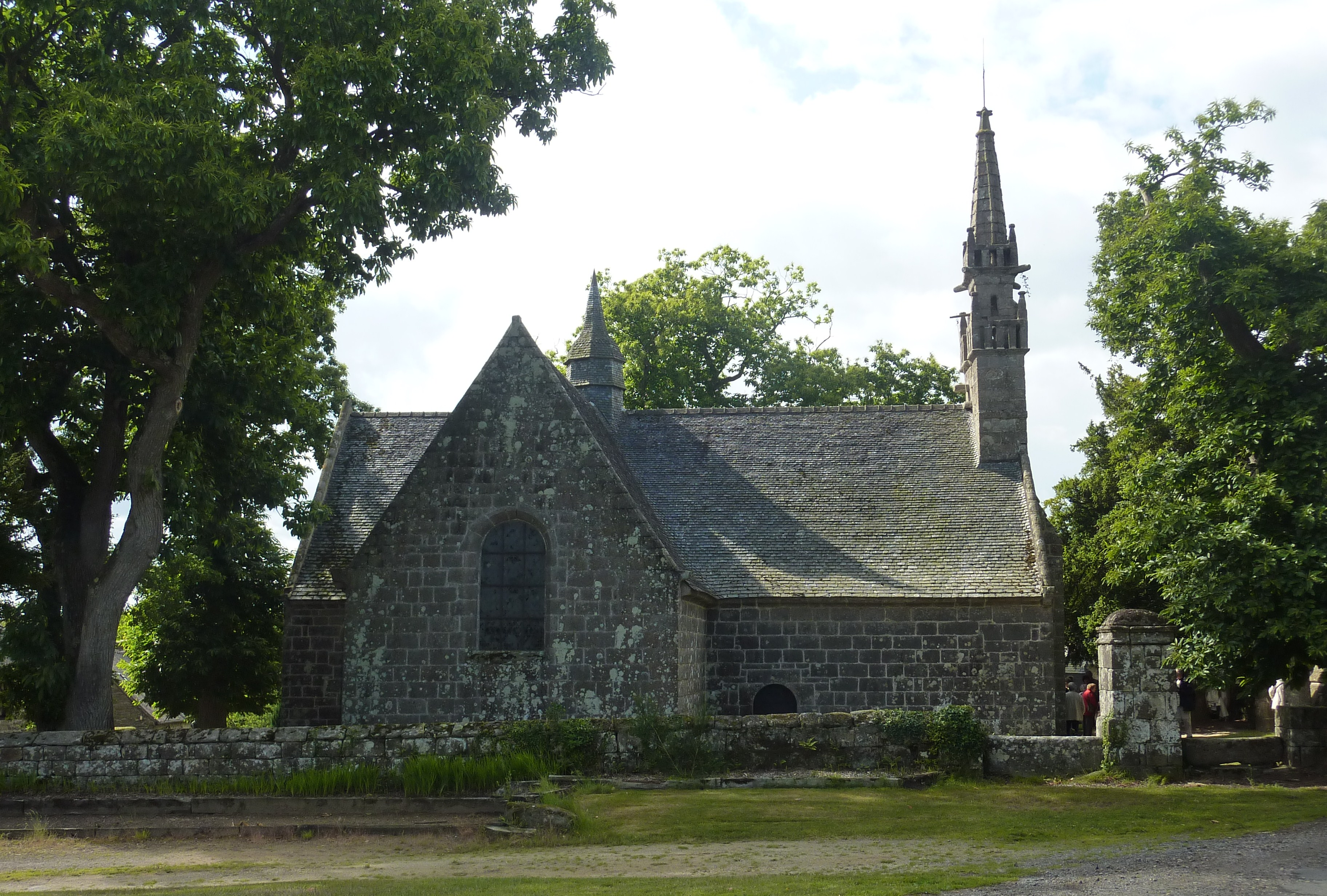 Sept-Saints (Vieux-Marché) : la Chapelle vue de la place du hameau